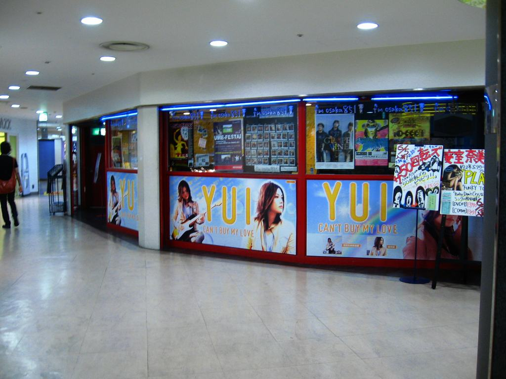 大阪マルビル地下1階のタワーレコード大阪マルビル店にあるfm osakaタワーステーション。